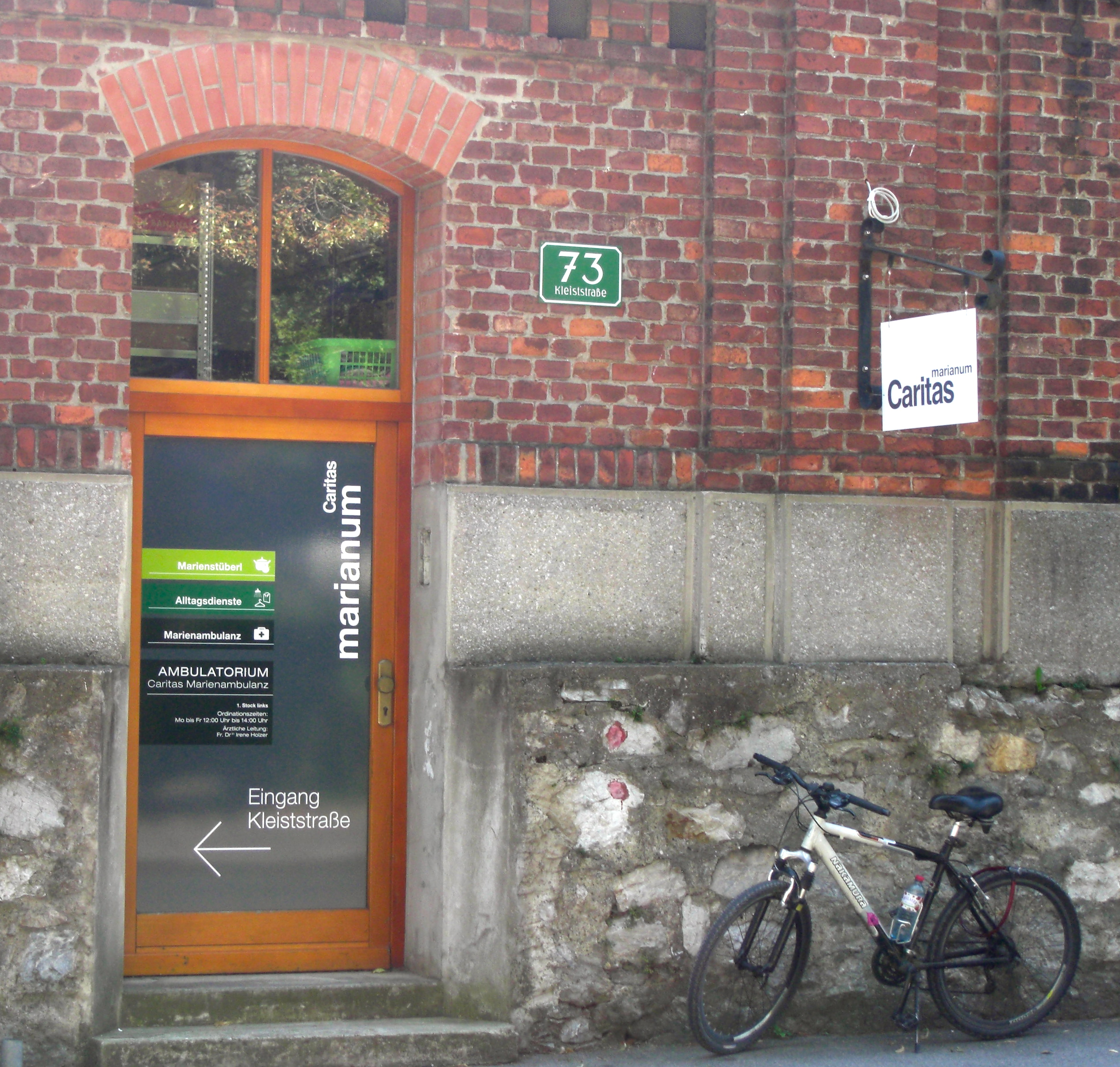 Türschild Marienambulanz